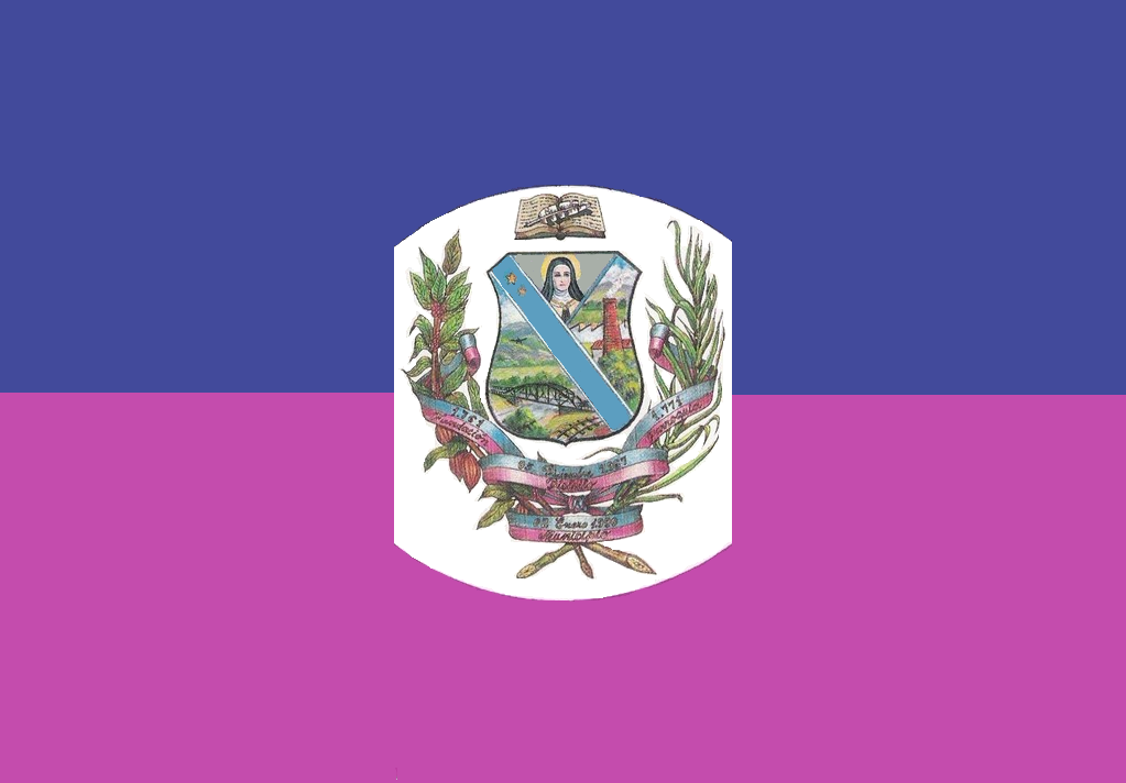 Bandera del municipio Independencia, estado Miranda, Venezuela